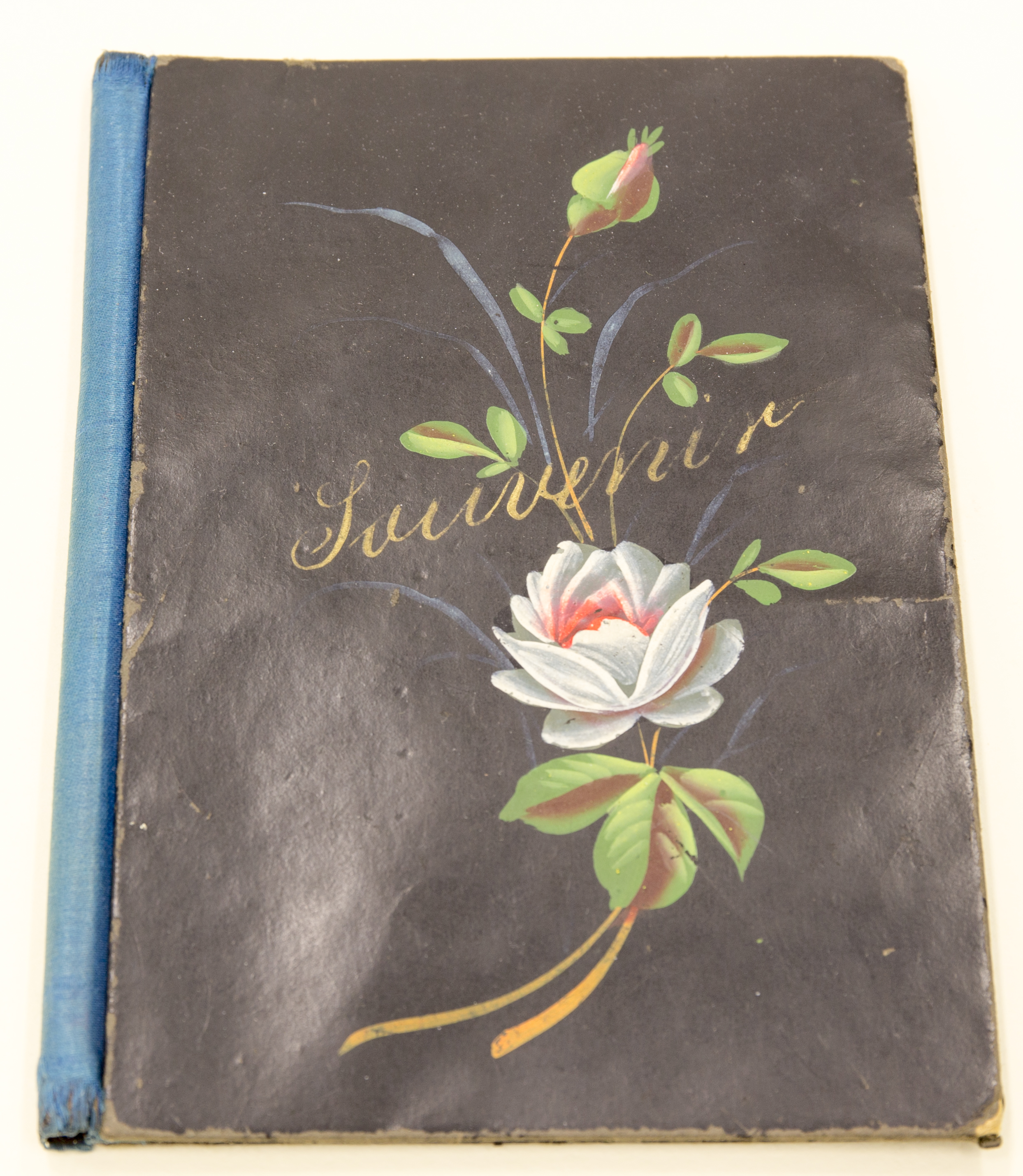 Schreibmappe Souvenir Indetifikations-Nr.: D (9 A 13) 40/1963 Datierung: um 1870 Gebrauchsort: Rathenow, Westhavelland, Brandenburg Höhe x Breite: 19 x 13 cm Ausgabe: Pappe, Stoffrücken Beschreibung: Kleine Mappe in Heftform, außen mit Rosen Bemalt und Schriftzug „Souvenir“, blauer Stoffrücken. Innen links Fach mit geschwungenem Rand (für Papier), im Rücken eine Lasche als Federhalter, rechts Löschpapier zwischen vier Ecken. A.dl Besitz der Martha Käpernick in Rathenow